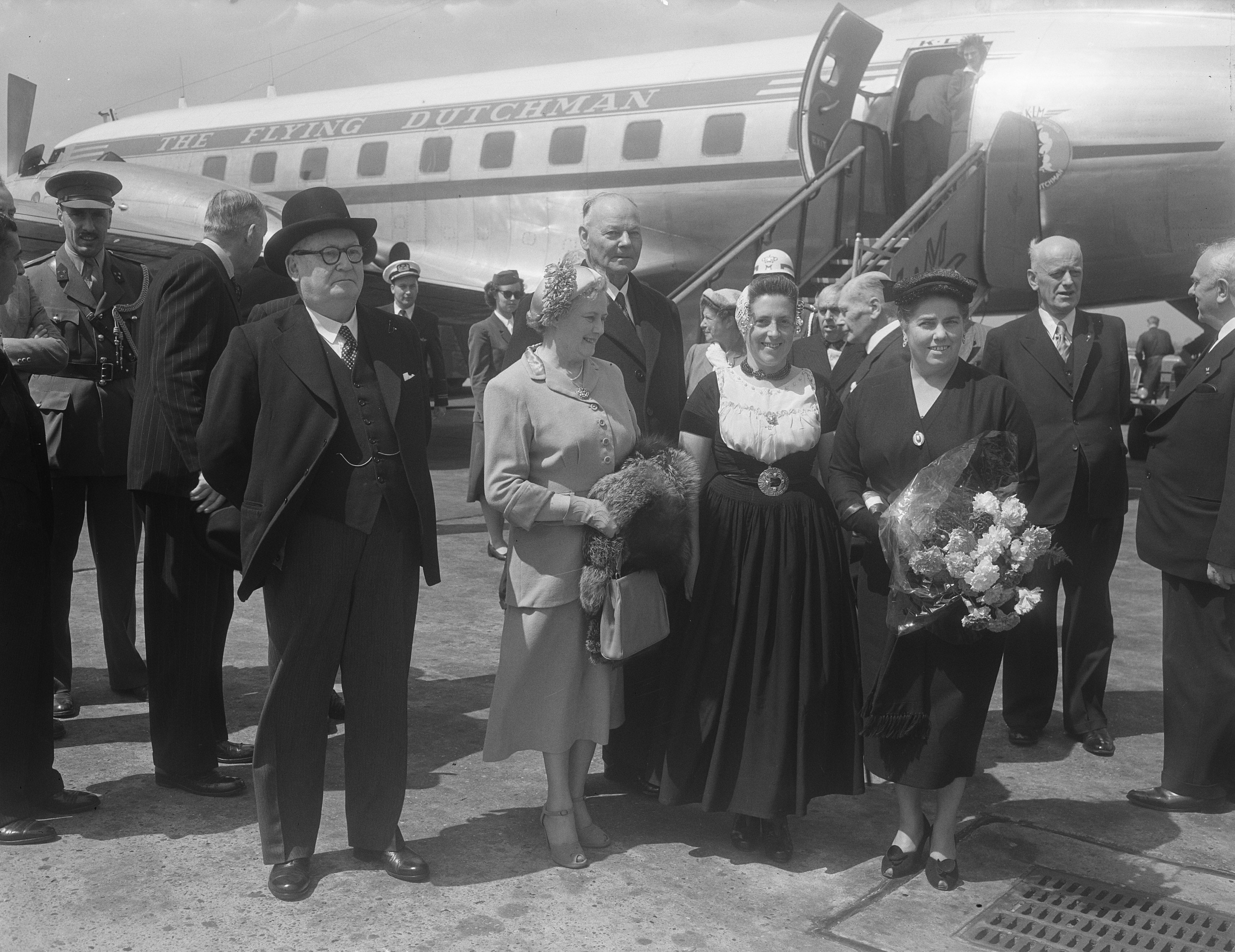 Collectie / Archief : Fotocollectie Anefo Reportage / Serie : [ onbekend ] Beschrijving : Zuid Afrikaanse Pr. dr. Malan op Schiphol Datum : 9 juni 1953 Locatie : Amsterdam, Noord-Holland Trefwoorden : aankomsten, vliegvelden Fotograaf : Pot, Harry / Anefo Auteursrechthebbende : Nationaal Archief Materiaalsoort : Glasnegatief Nummer archiefinventaris : bekijk toegang 2.24.01.09 Bestanddeelnummer : 905-7712